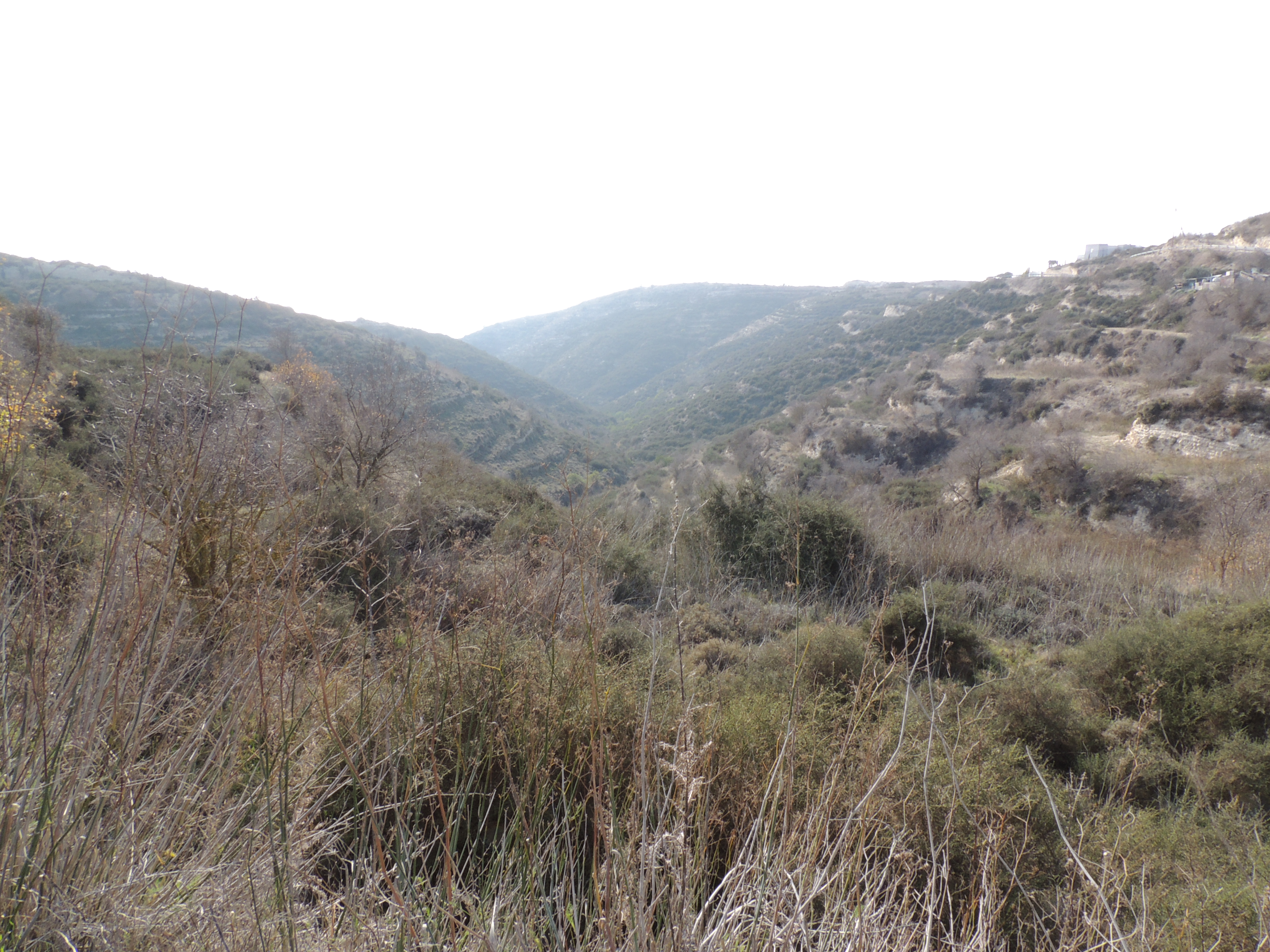 Tsada, Cyprus